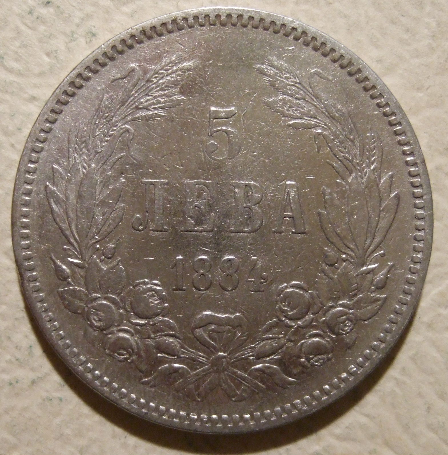 US silver dollar sized coin valued at 5 leva from Bulgaria, 1884.